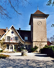 mairie de tresserve